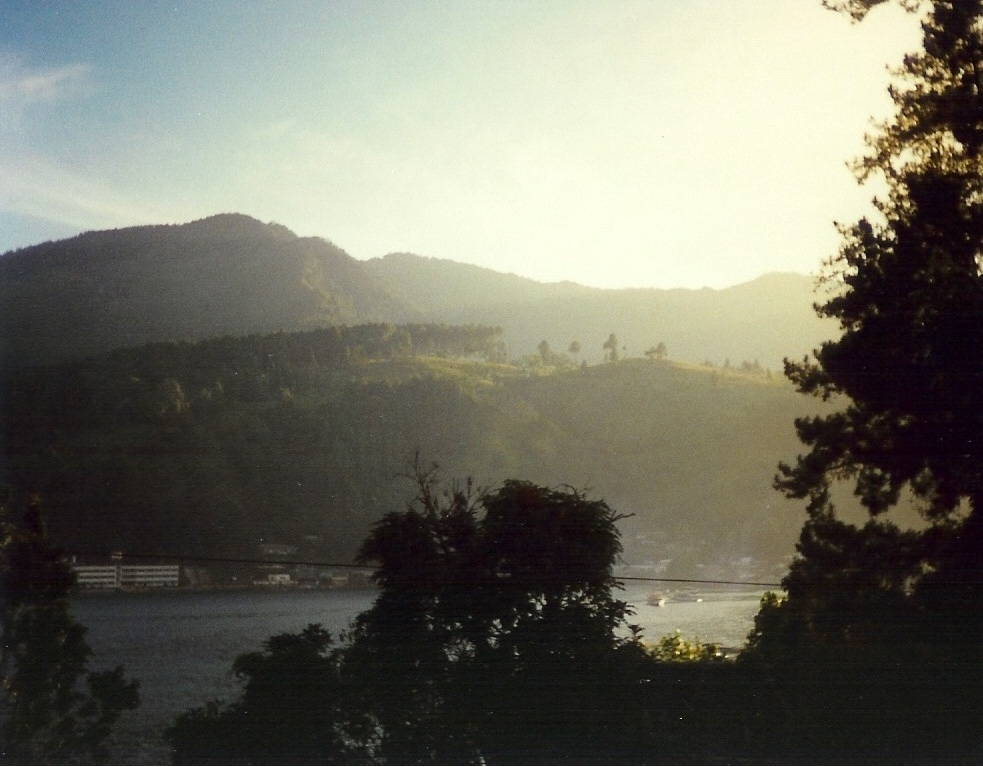 Zelf gemaakt. BesselDekker 5 nov 2005 17:41 (CET)